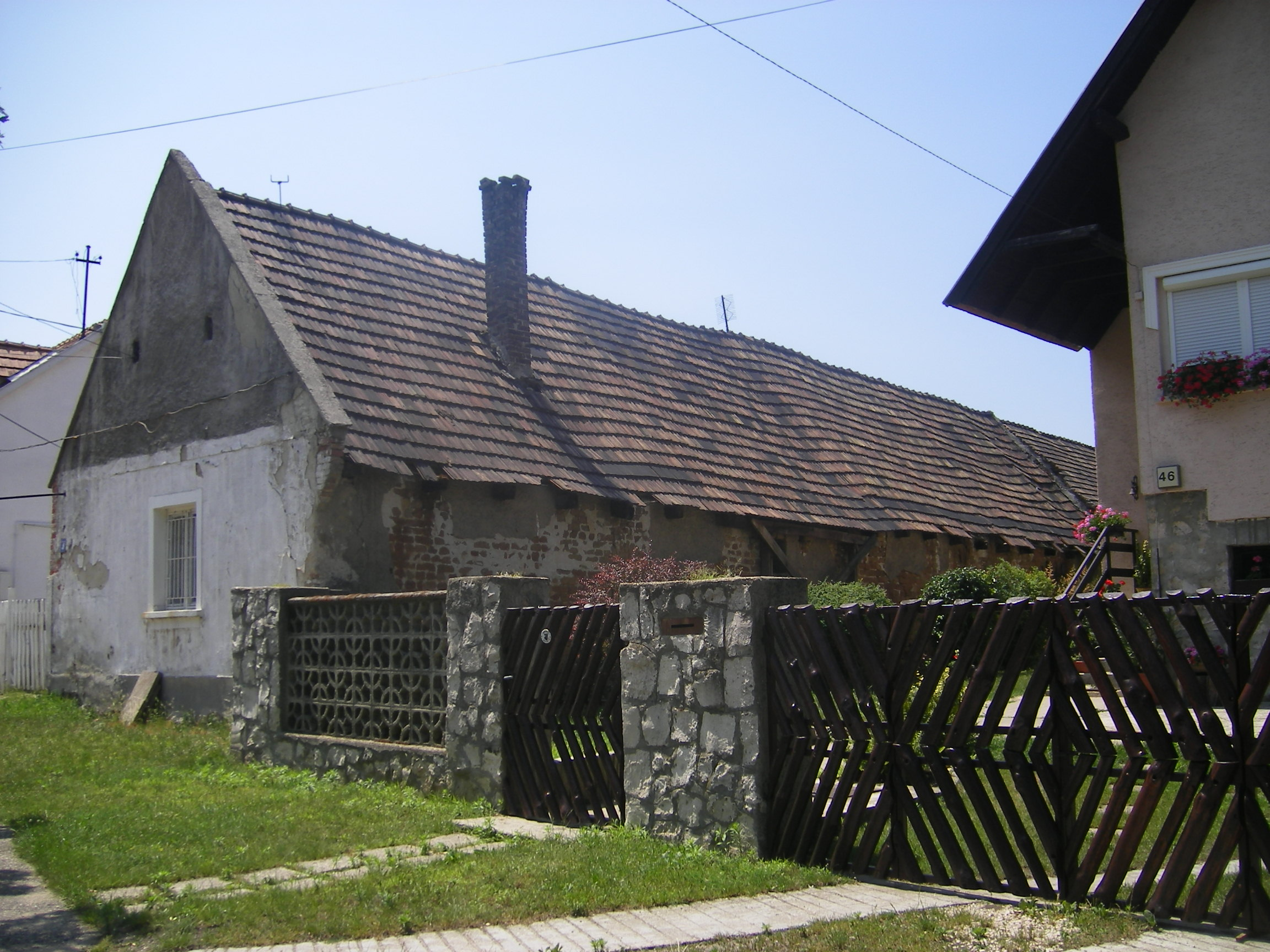 régi ház Felsőgallán